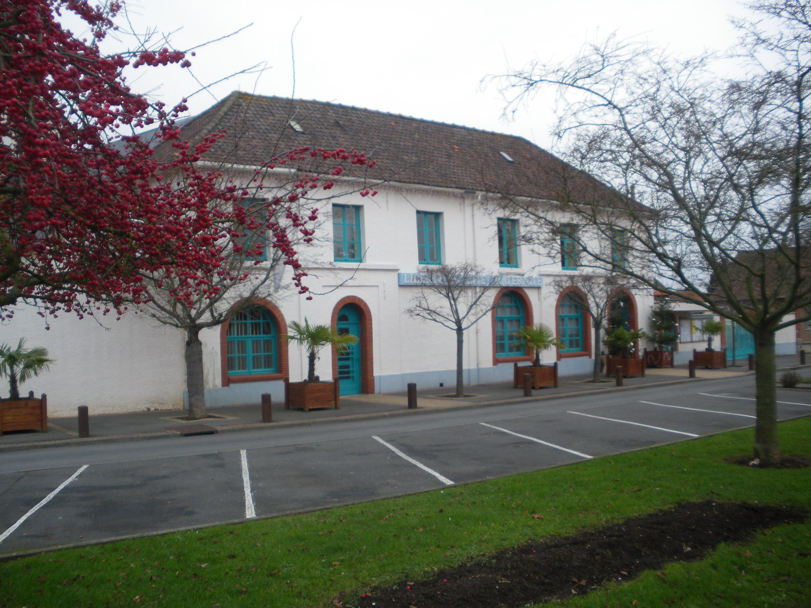 Vue de la mairie d'Haillicourt.